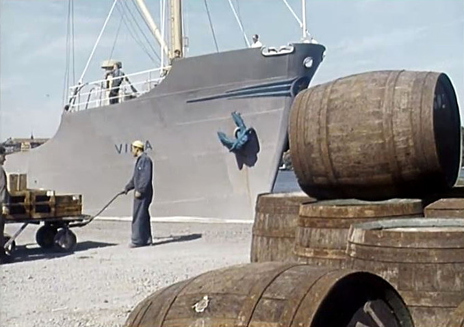 AB Vin & Sprits tankfartyg "M/S Vinia" vid Liljeholmskajen